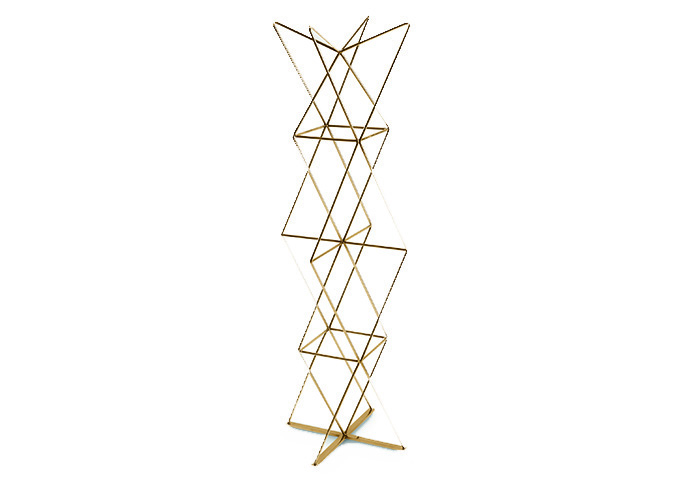 DABLIUHANGER